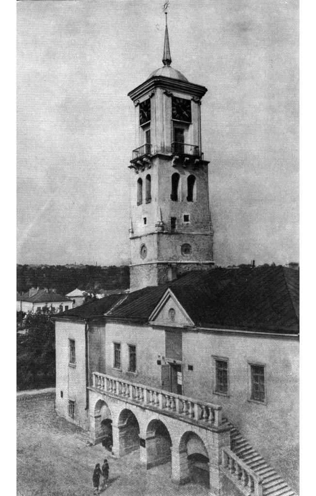 Каменец-Подольская Ратуша, 14 век